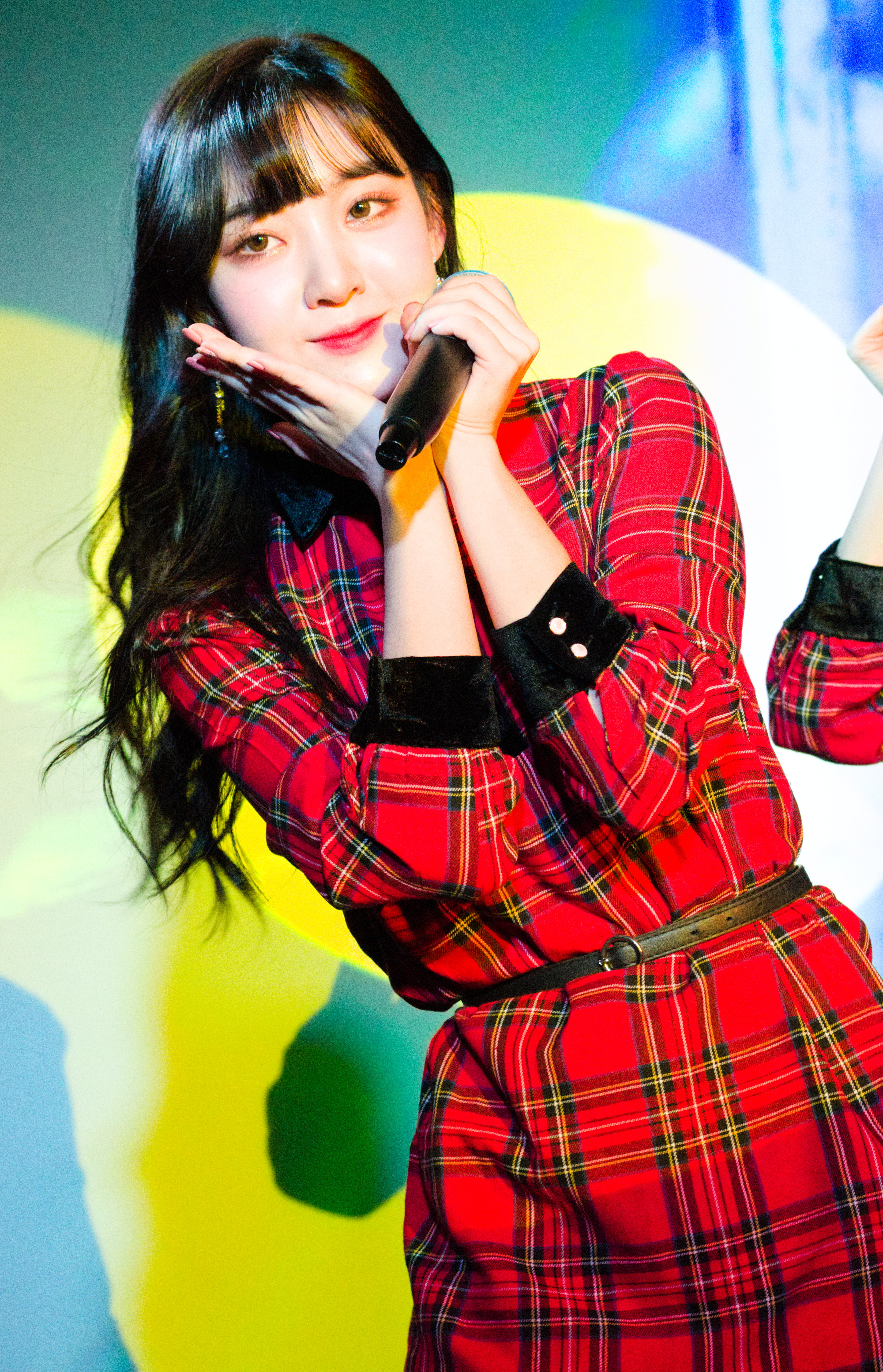 S.I.S CHRISTMAS CONCERT 20181225 2部 ガウル